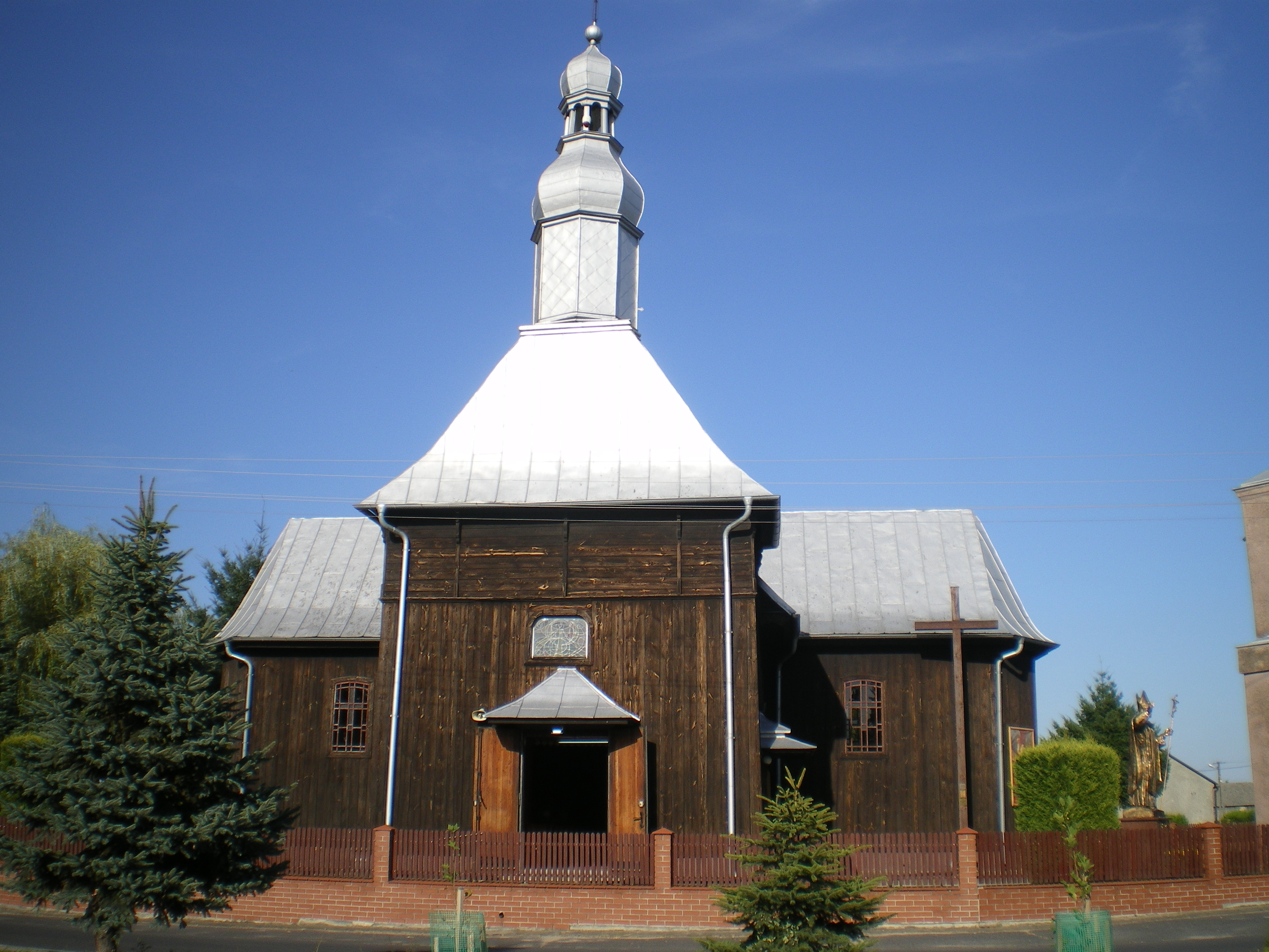 Żdżary - kościół pw. św. Bartłomieja, drewniany, 2 poł. XVIII w.